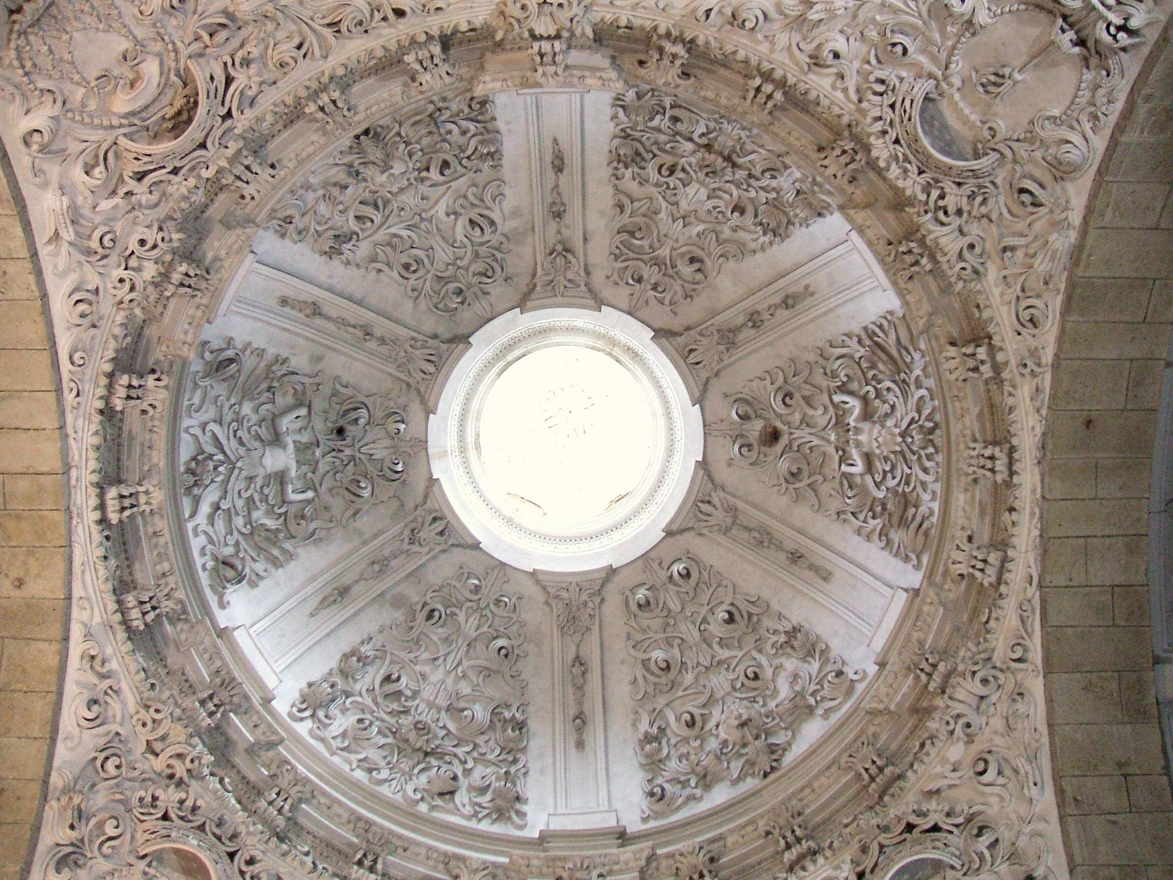 Convento de las Agustinas Recoletas (Palencia)